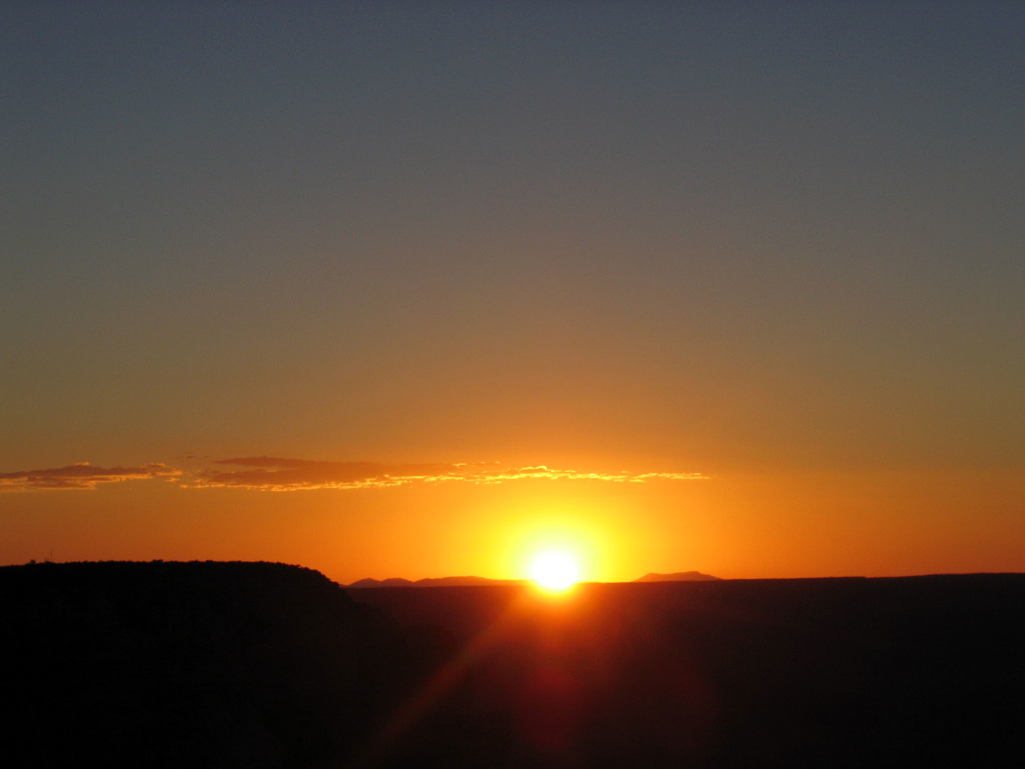 Sonnenuntergang über dem Grand Canyon Source: selbst gemacht